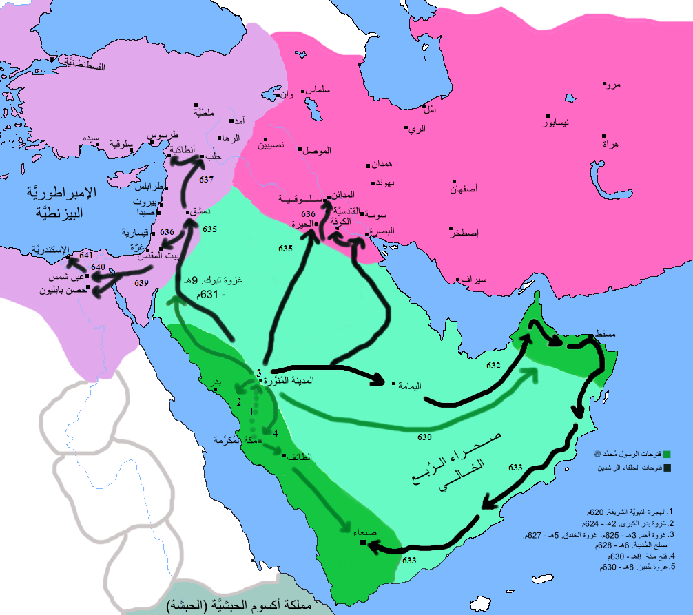 فُتوحات الرسول مُحمَّد والخُلفاء الراشدين بين سنتيّ 630 و641م